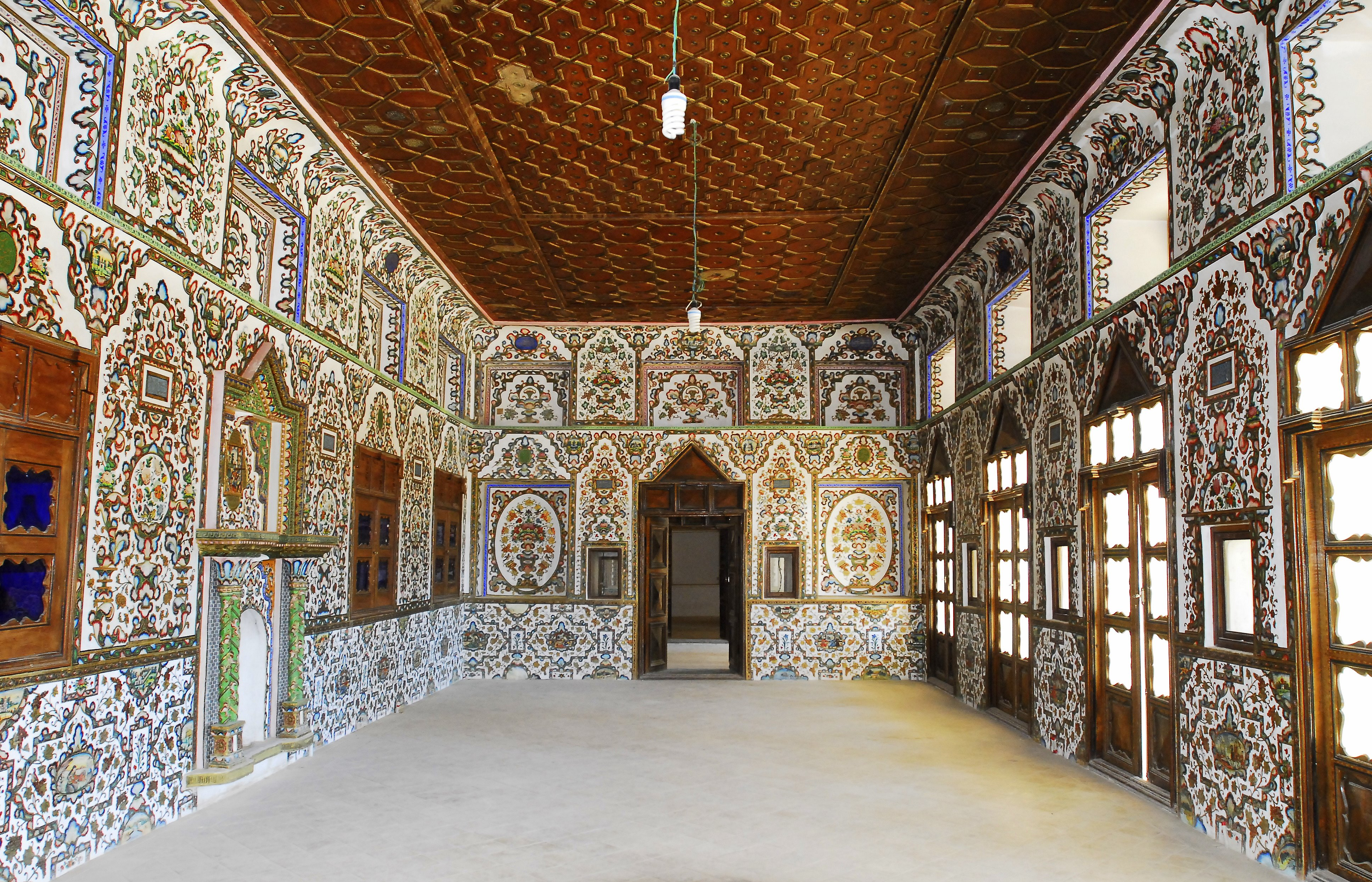 چالشتر